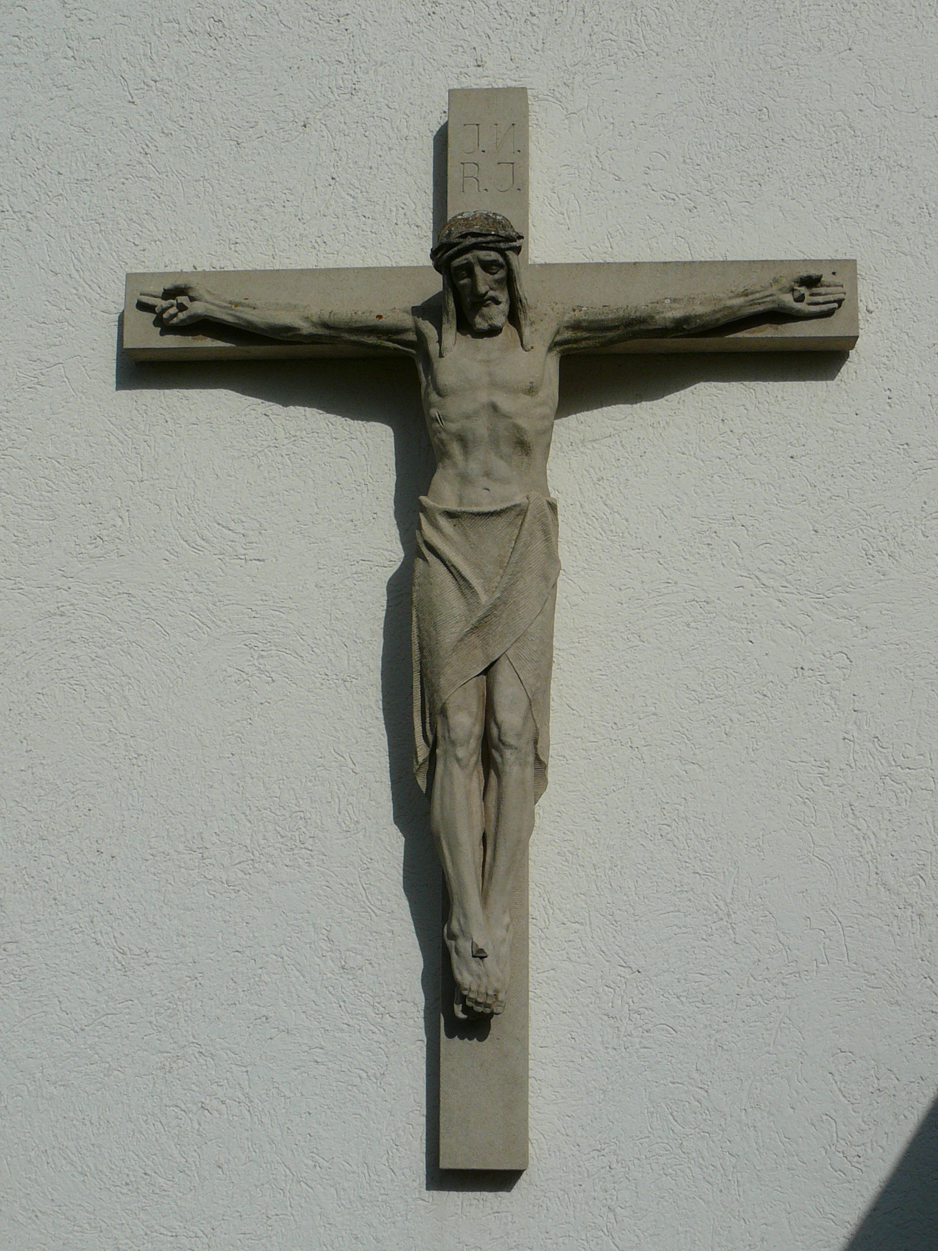 Römisch-katholische Pfarrkirche St. Judas Thaddäus Eglisau, Kreuz an der Südwand